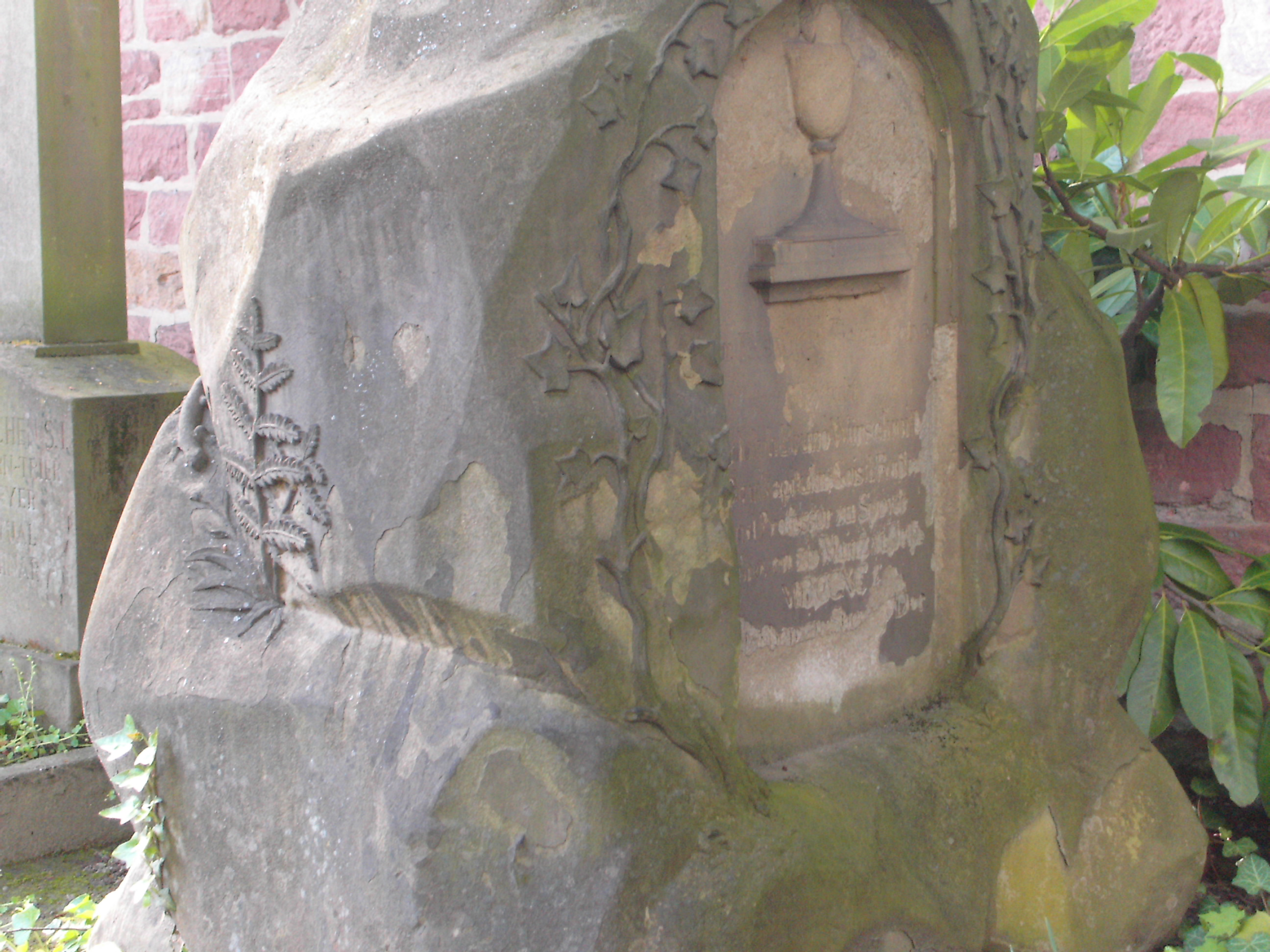 Grabstein Domkapitular Bruno Würschmitt, Domkapitelsfriedhof Speyer 2008